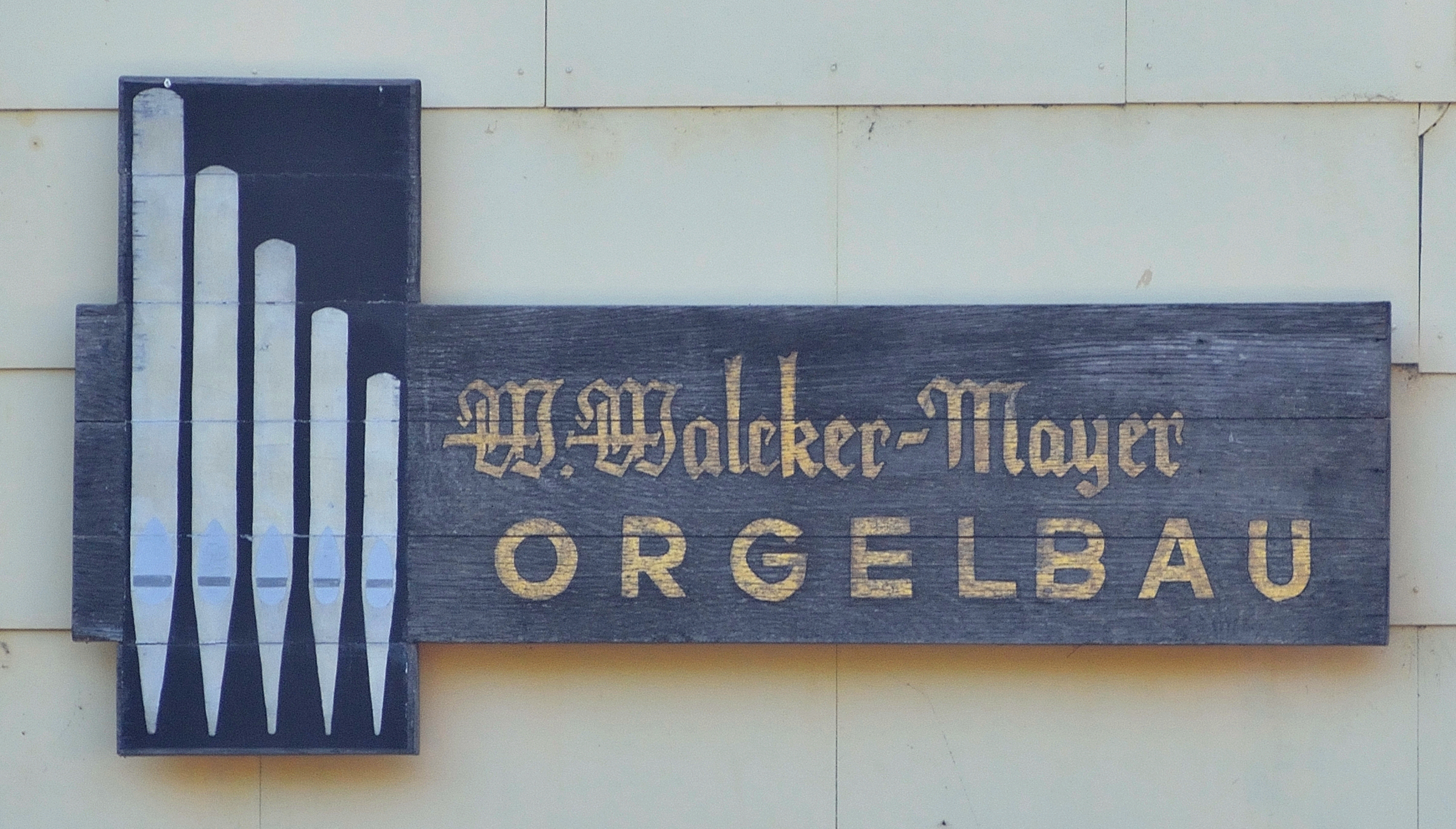 Produktionsstätte der Firma Orgelbau M. Walcker-Mayer im niederösterreichischen Guntramsdorf.